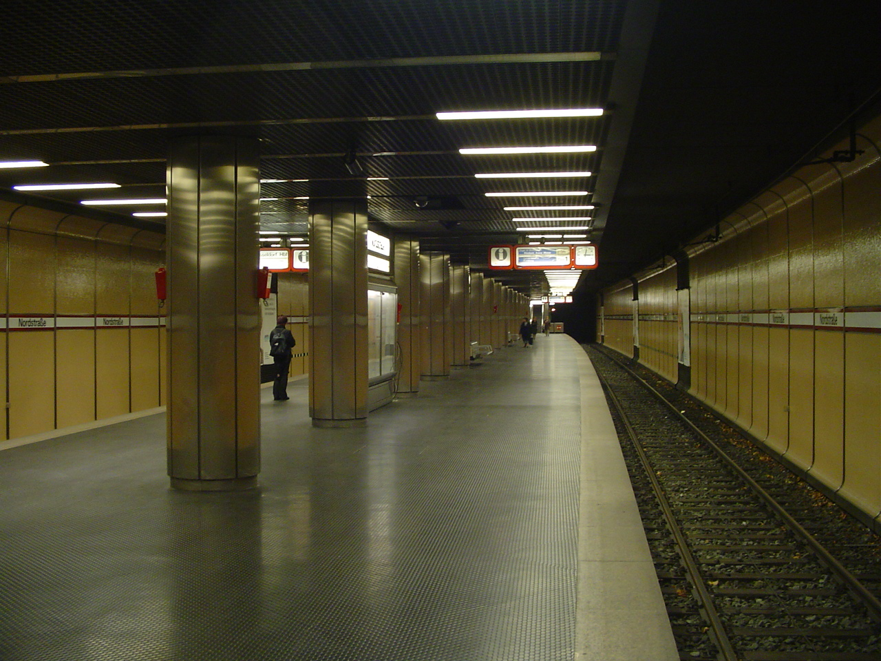 Stadtbahnnetz Rhein-Ruhr, Station Düsseldorf Nordstraße